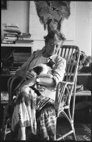 Szántó Piroska szentendrei műtermében